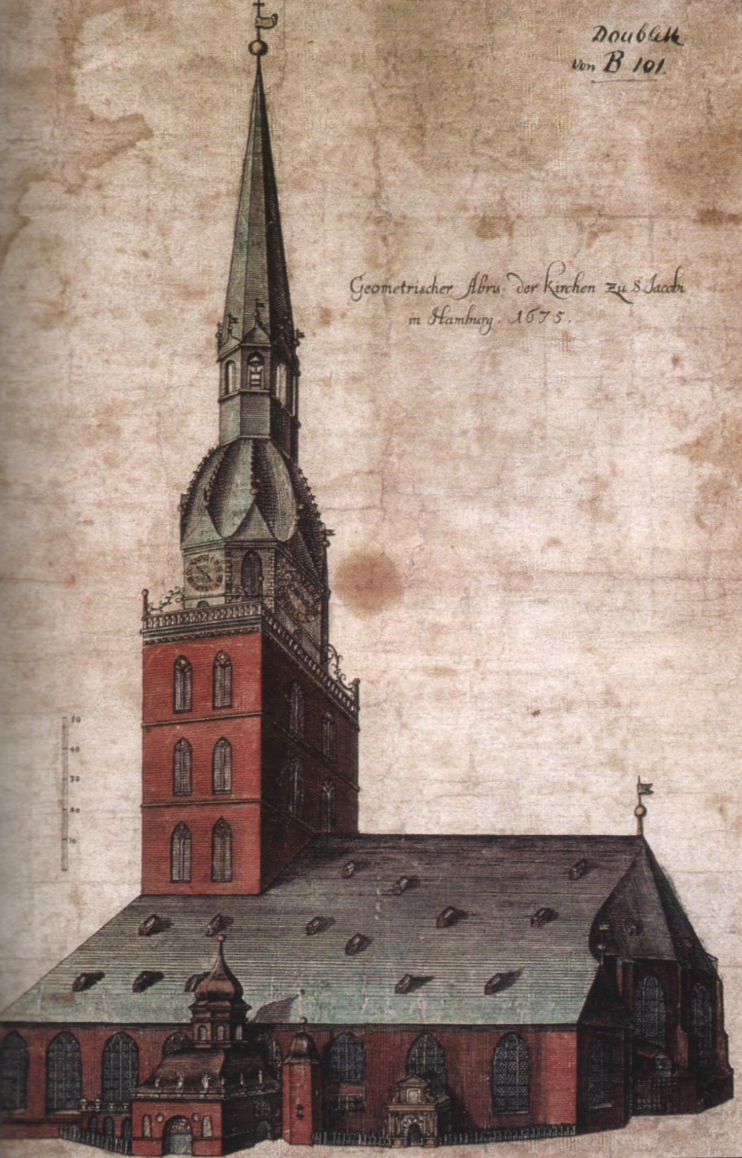 Geometrischer Abriß der Kirchen zu S. Jacobi, von Heinrich Volckmeir 1675